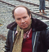 Philippe Théaudière (1942-2016), directeur de la photographie, en 1981.